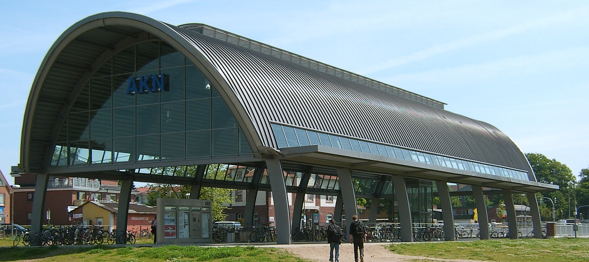 Kaltenkirchen, Bahnhof